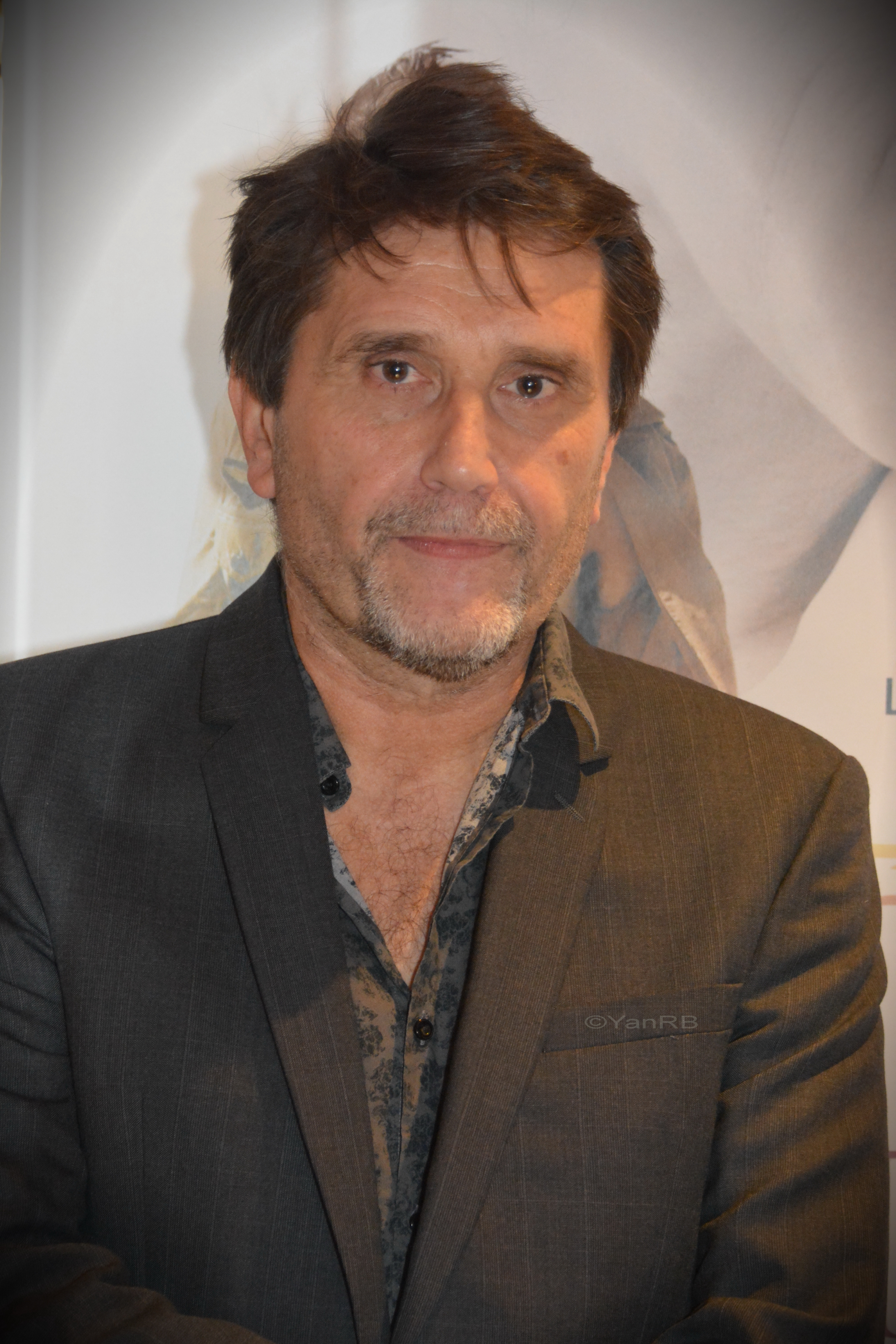 Eric Barbier à l'avant 1er de son film La promesse de l'aube au Gaumont Wilson Toulouse